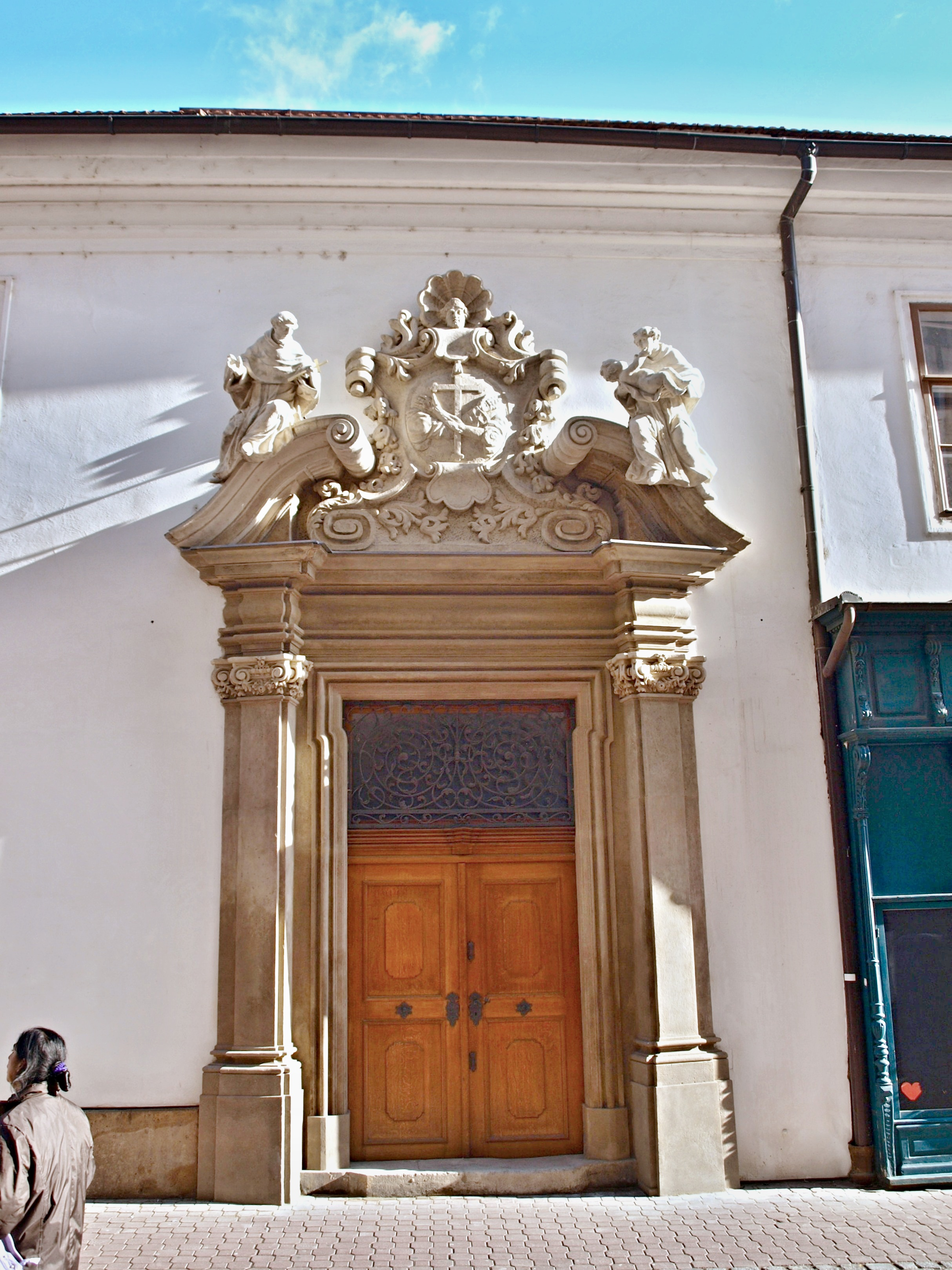 Brno, Kostel sv. Jana Křtitele a sv. Jana Evangelisty